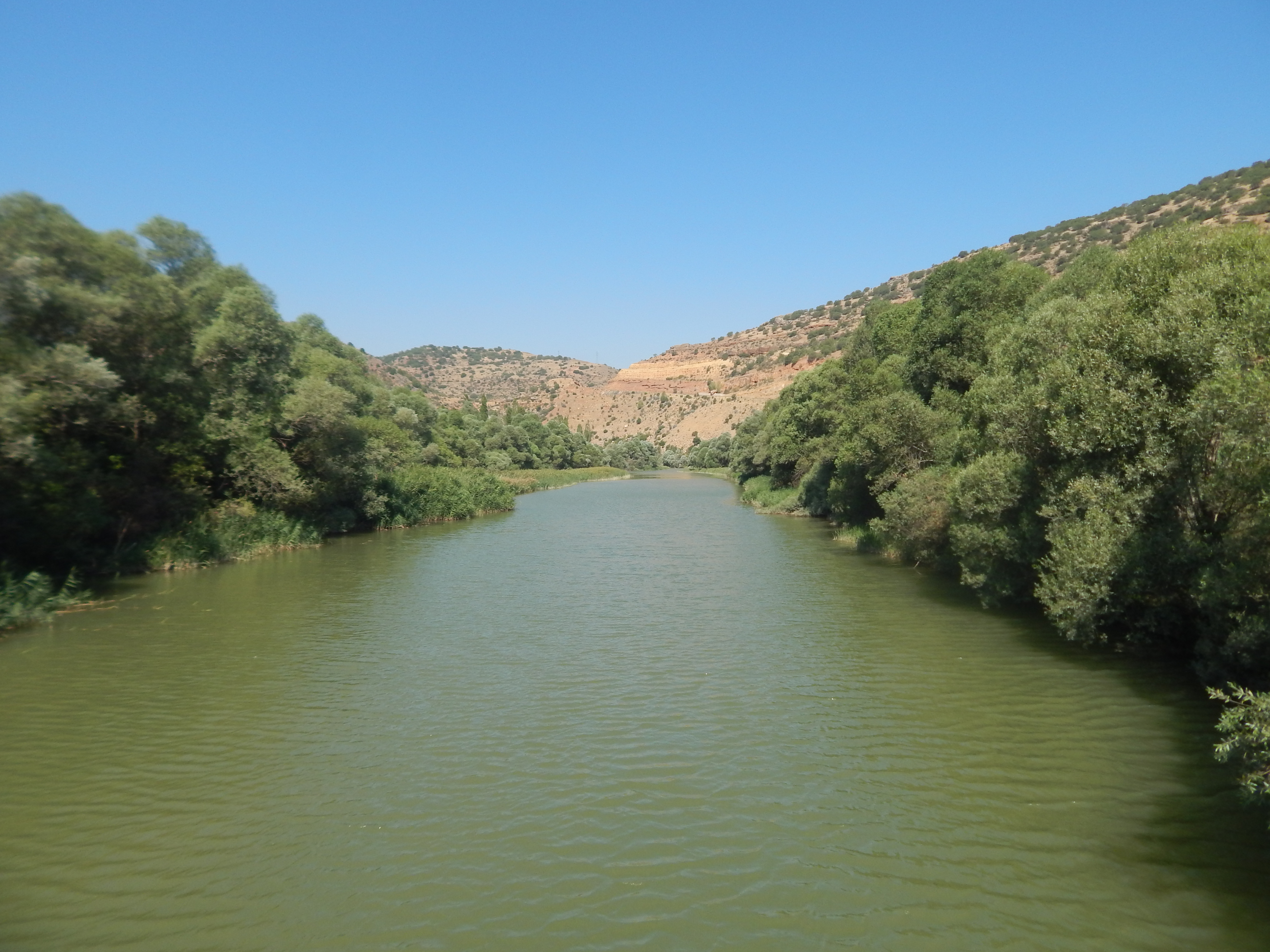 38500 Zamantı River, Balcıçakırı/Yahyalı/Kayseri, Turkey